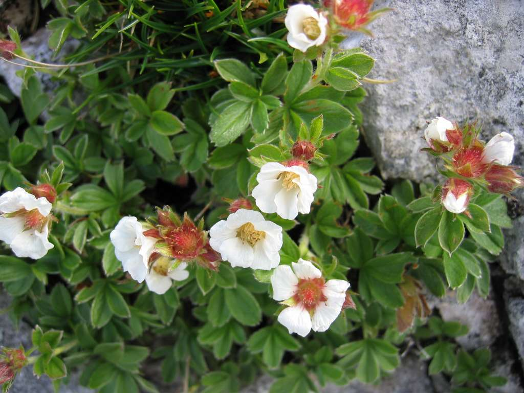 Clusius-Fingerkraut (Potentilla clusiana), Fundort: Großer Pyhrgas, Oberösterreich, Österreich